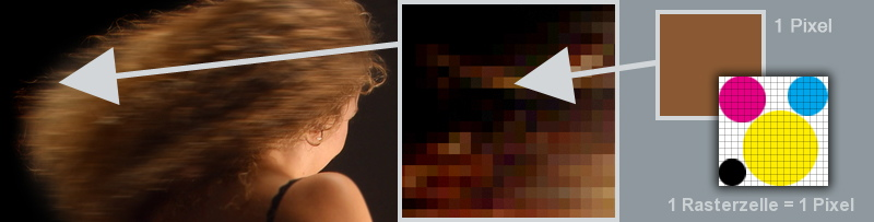 Der Unterschied zwischen dpi und ppi